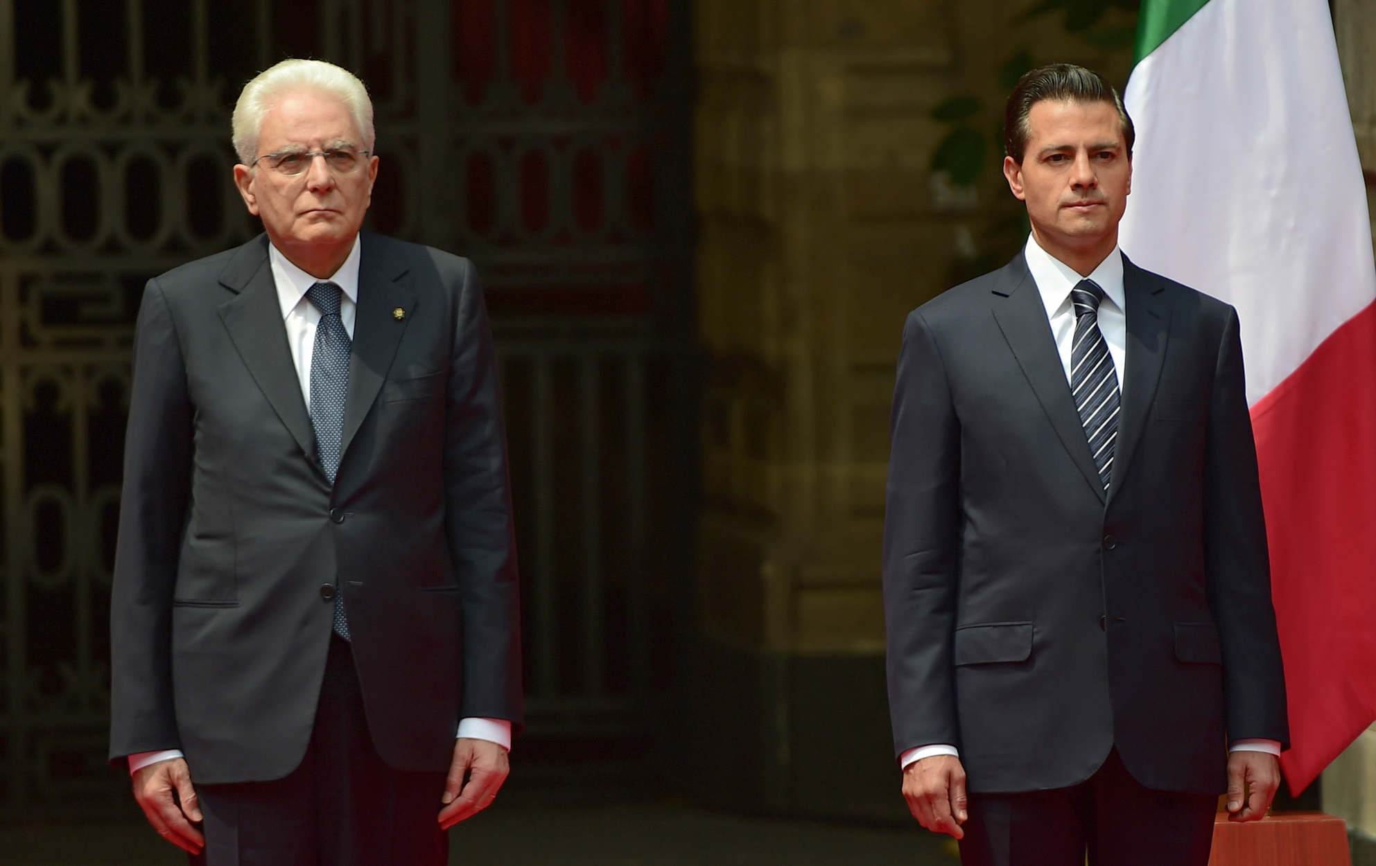 Sergio Mattarella en Mexico